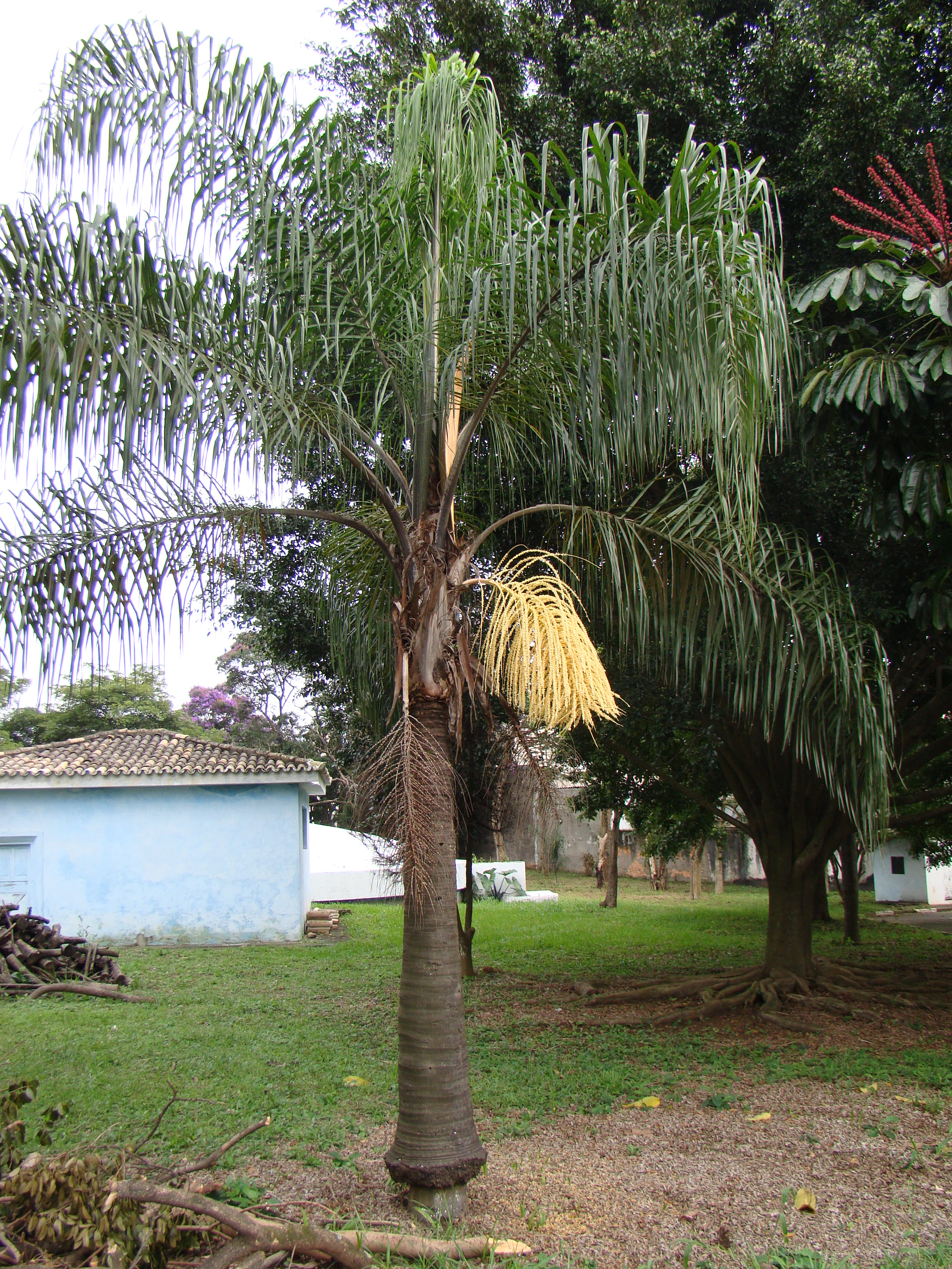 Ceret S�o Paulo